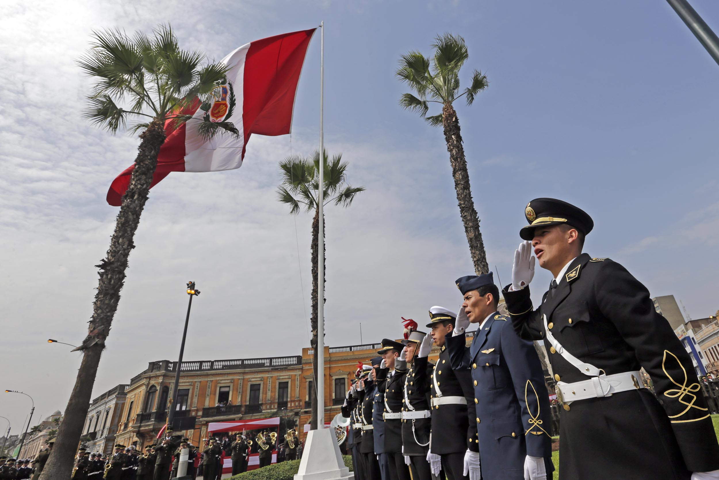 El ministro de Defensa, Pedro Cateriano Bellido, participó esta mañana en la ceremonia de conmemoración por el 133 aniversario de la Batalla de Arica y de renovación del juramento de fidelidad a la Bandera por parte de las Fuerzas Armadas.